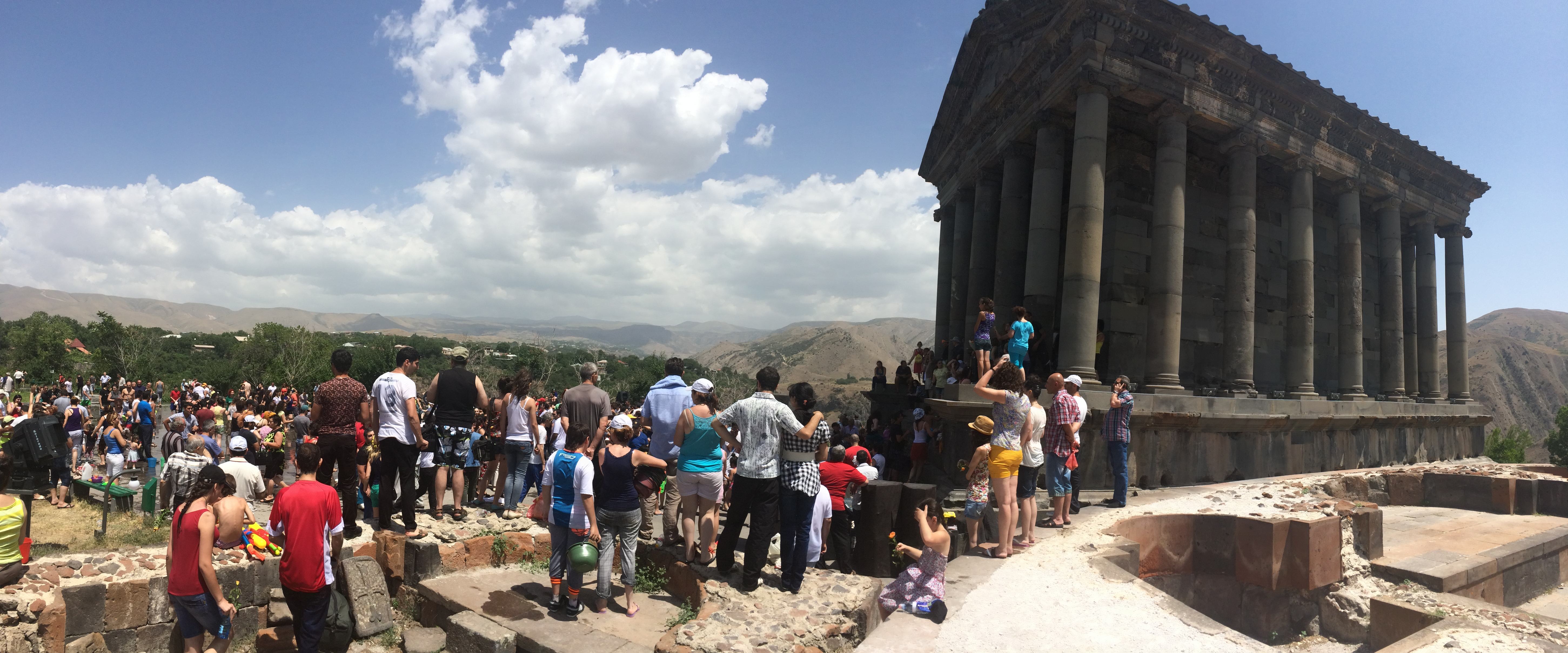 Նոր հեթանոսական արարողություն Գառնու տաճարում